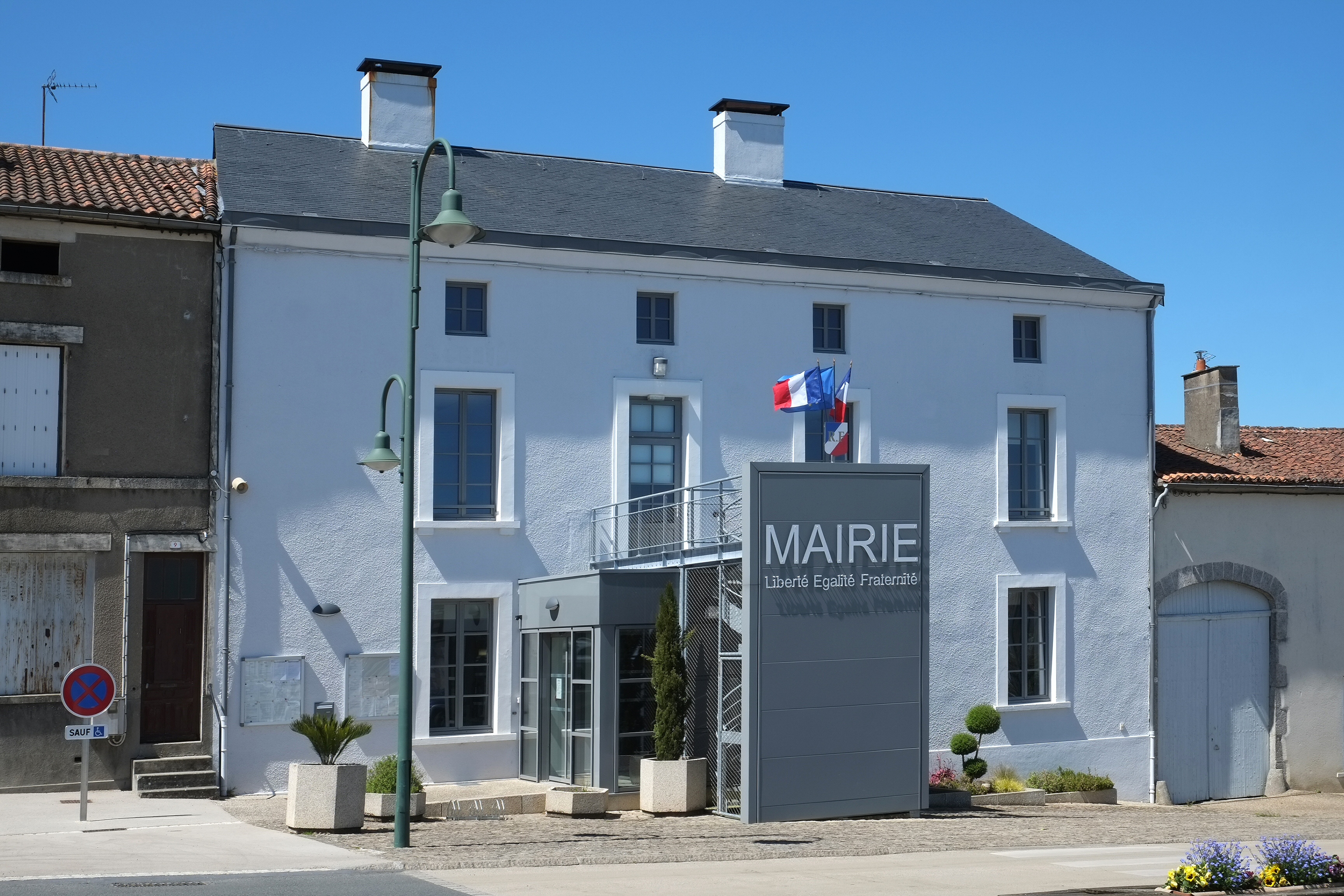 Mairie L'Absie Deux-Sèvres France